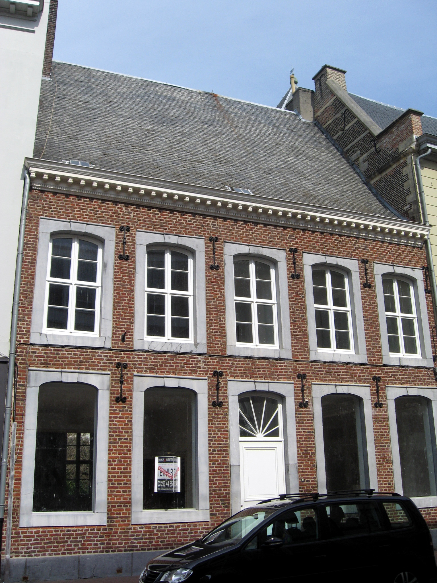 Burgerhuis Het Lombardenhuys, Kapelstraat 51 in Hasselt